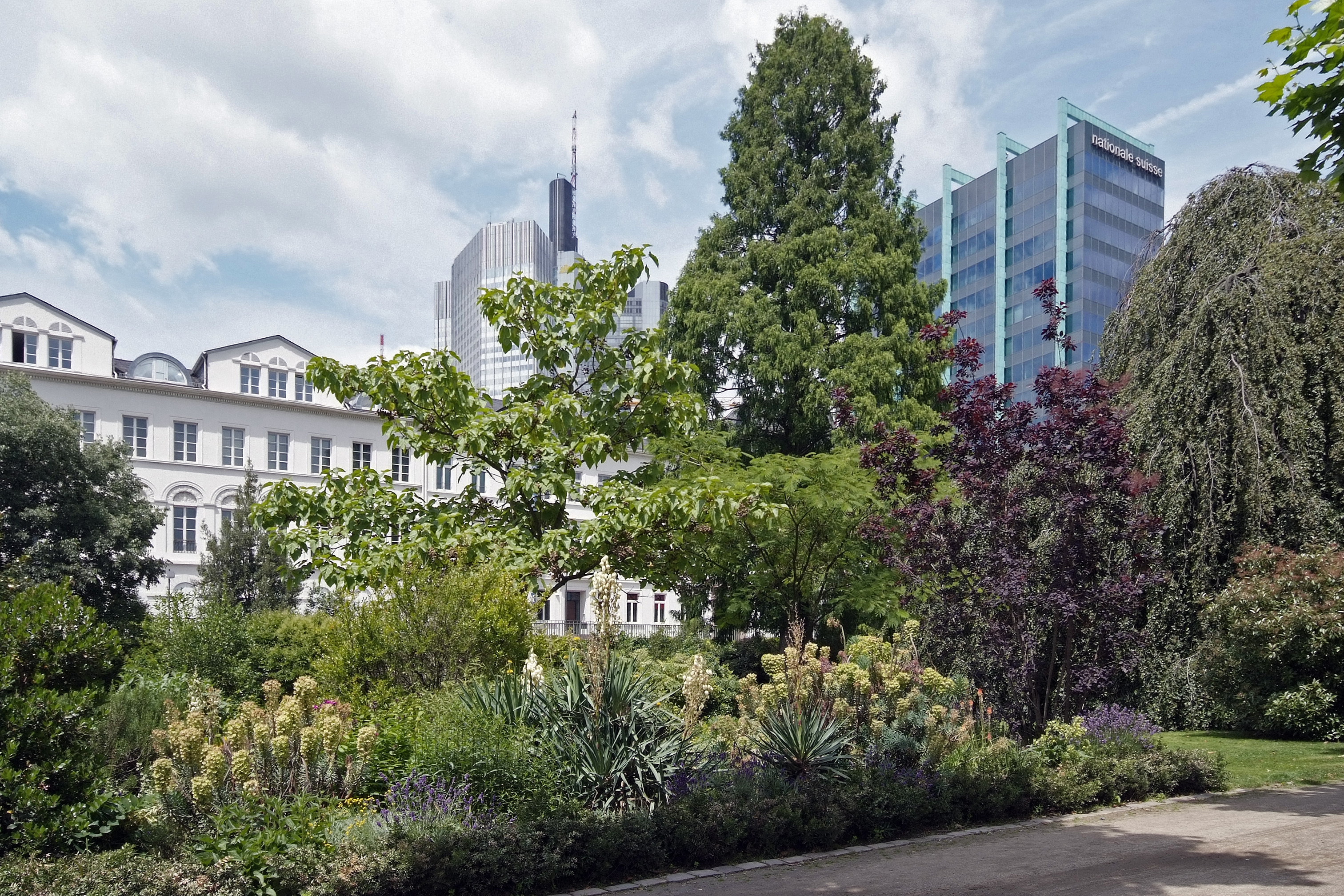 Nizza-Anlage am Mainufer in Frankfurt am Main